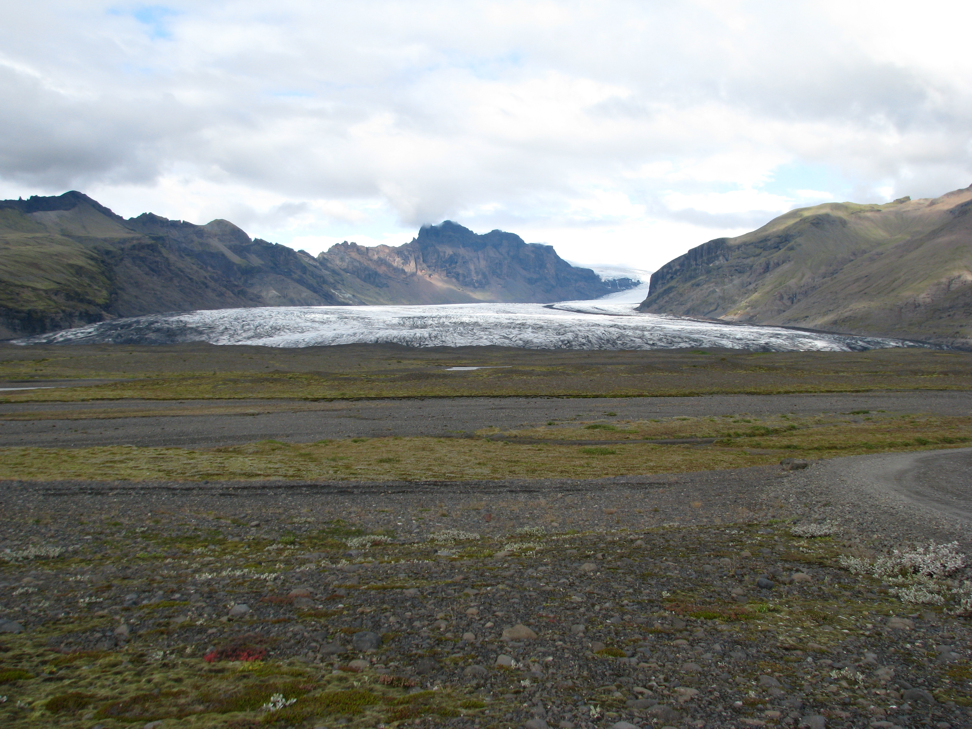 Skaftafellsjökull, glacier, Iceland